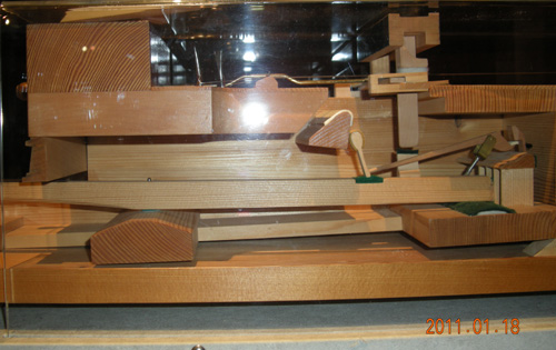 浜松博物館にある、ウィーン式アクションの構造模型写真、SUMIMILIが直接撮影。